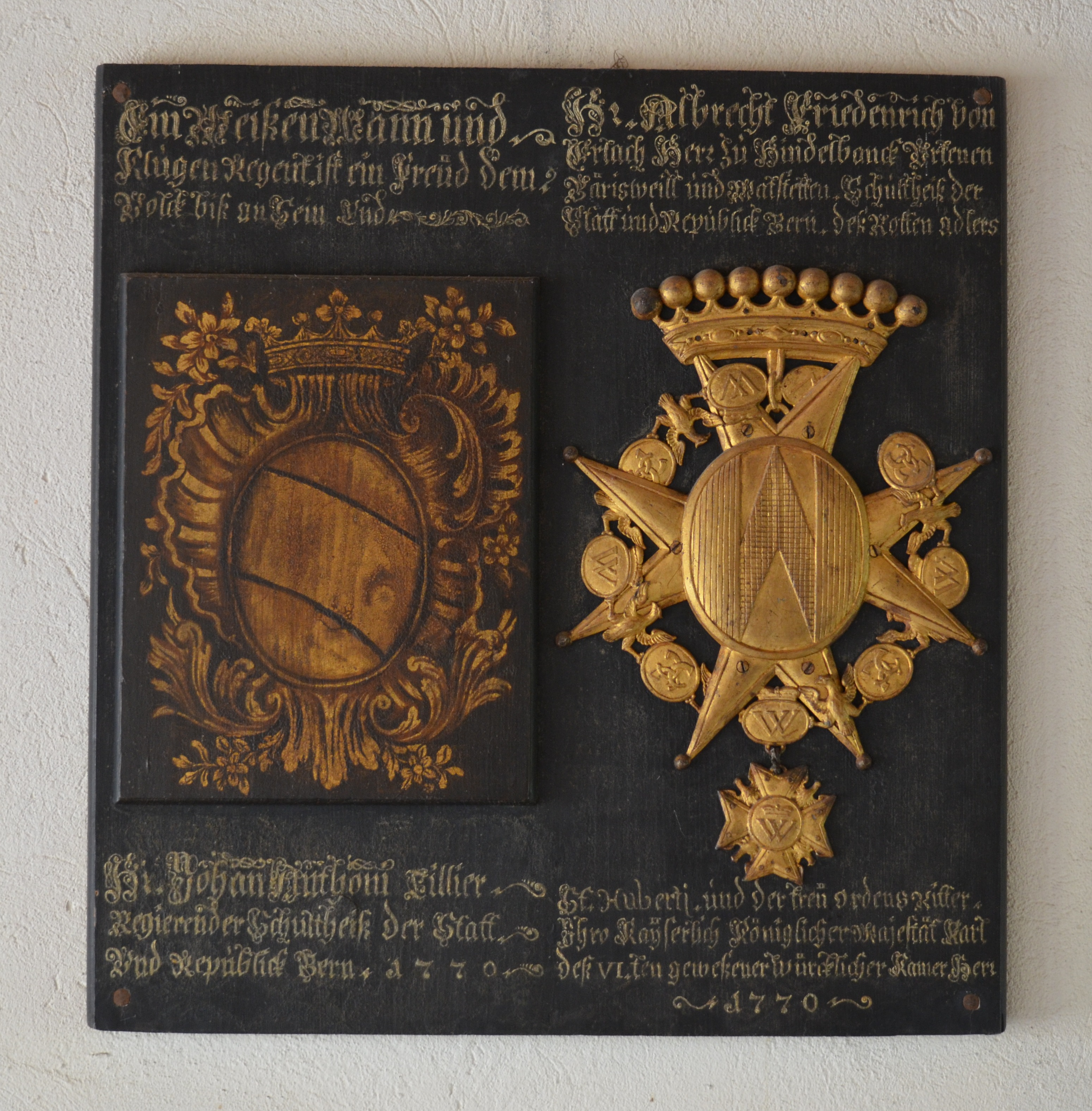 Zimmerwald, Kirche, Foyer, Wappentafel Tillier und von Erlach